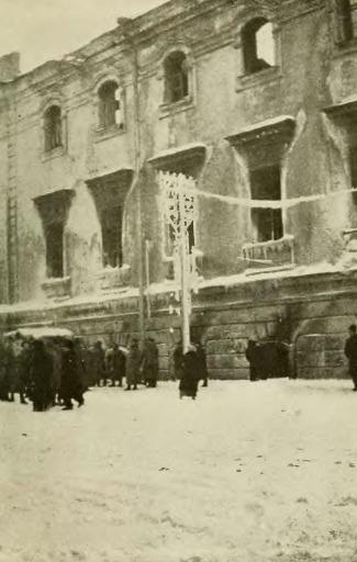 Ruinas del palacio de justicia, Petrogrado, marzo de 1917.